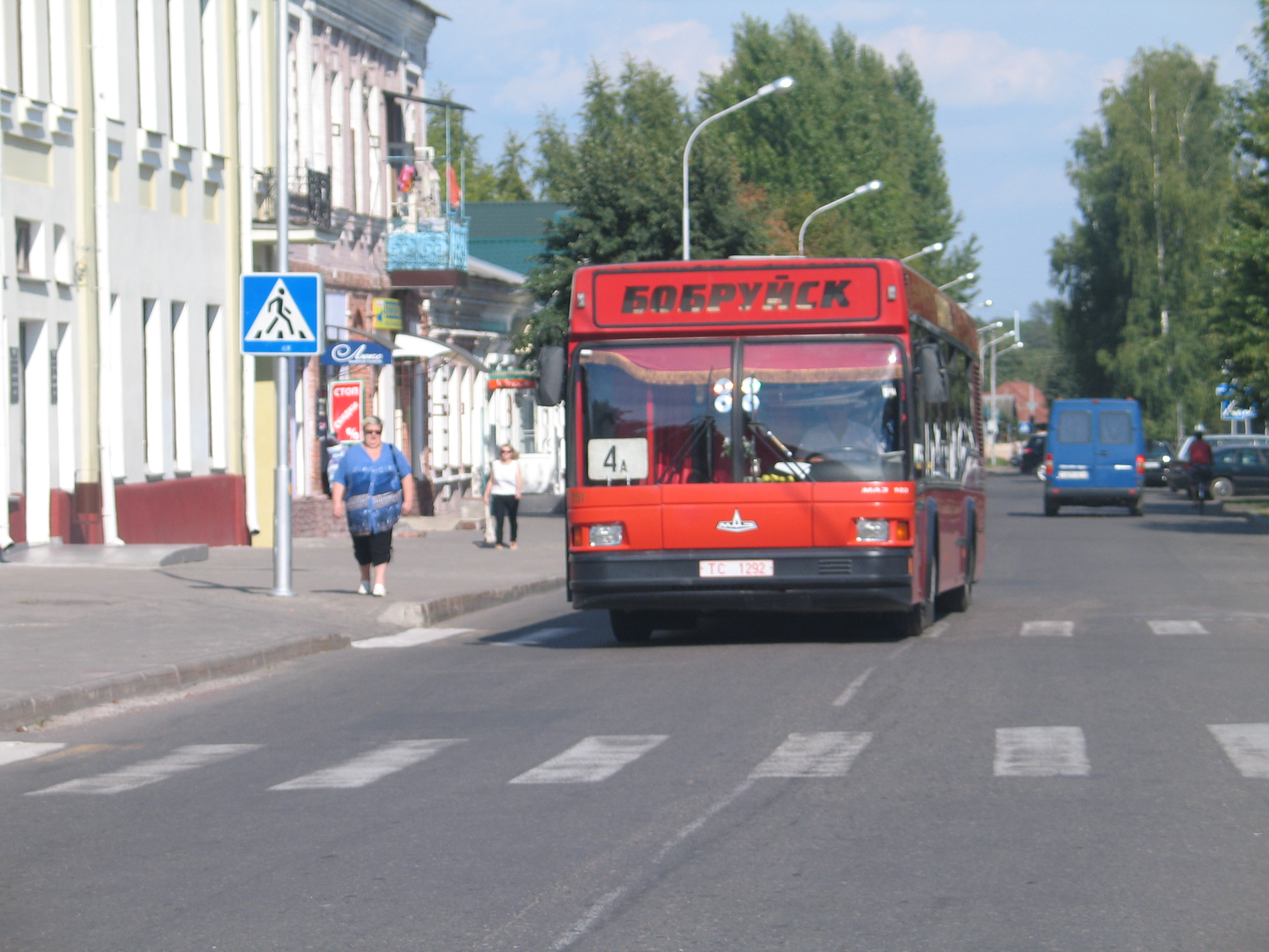 Автобус в Бобруйске